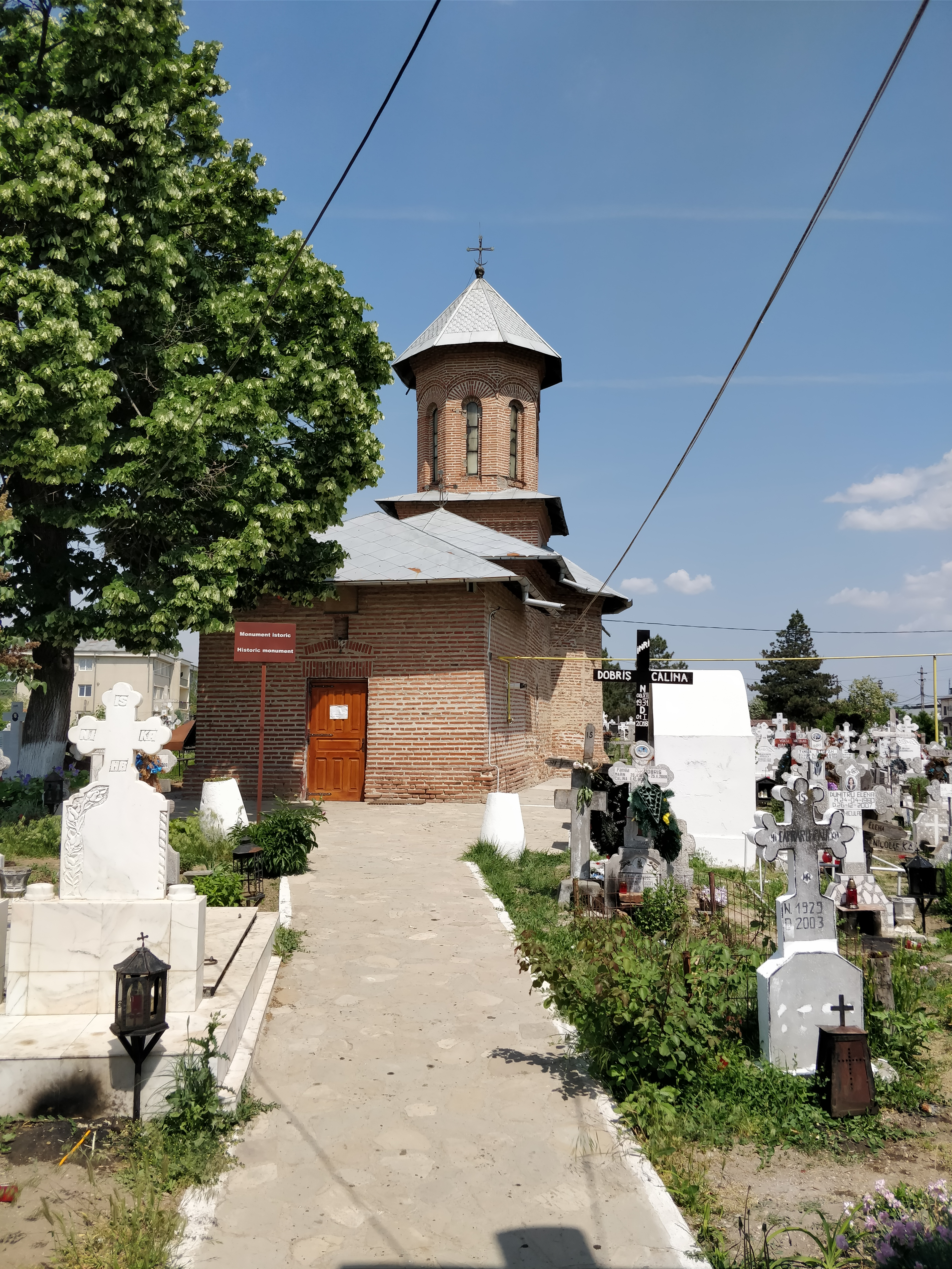 Biserica „Adormirea Maicii Domnului” - Sadina, a fostului schit Roata